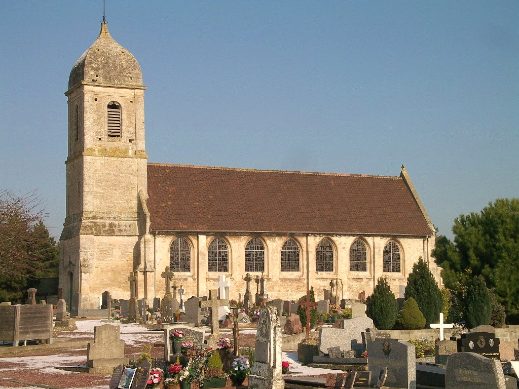 Eglise St Martin à Giberville dans le Calvados (XIV ème Siècle)